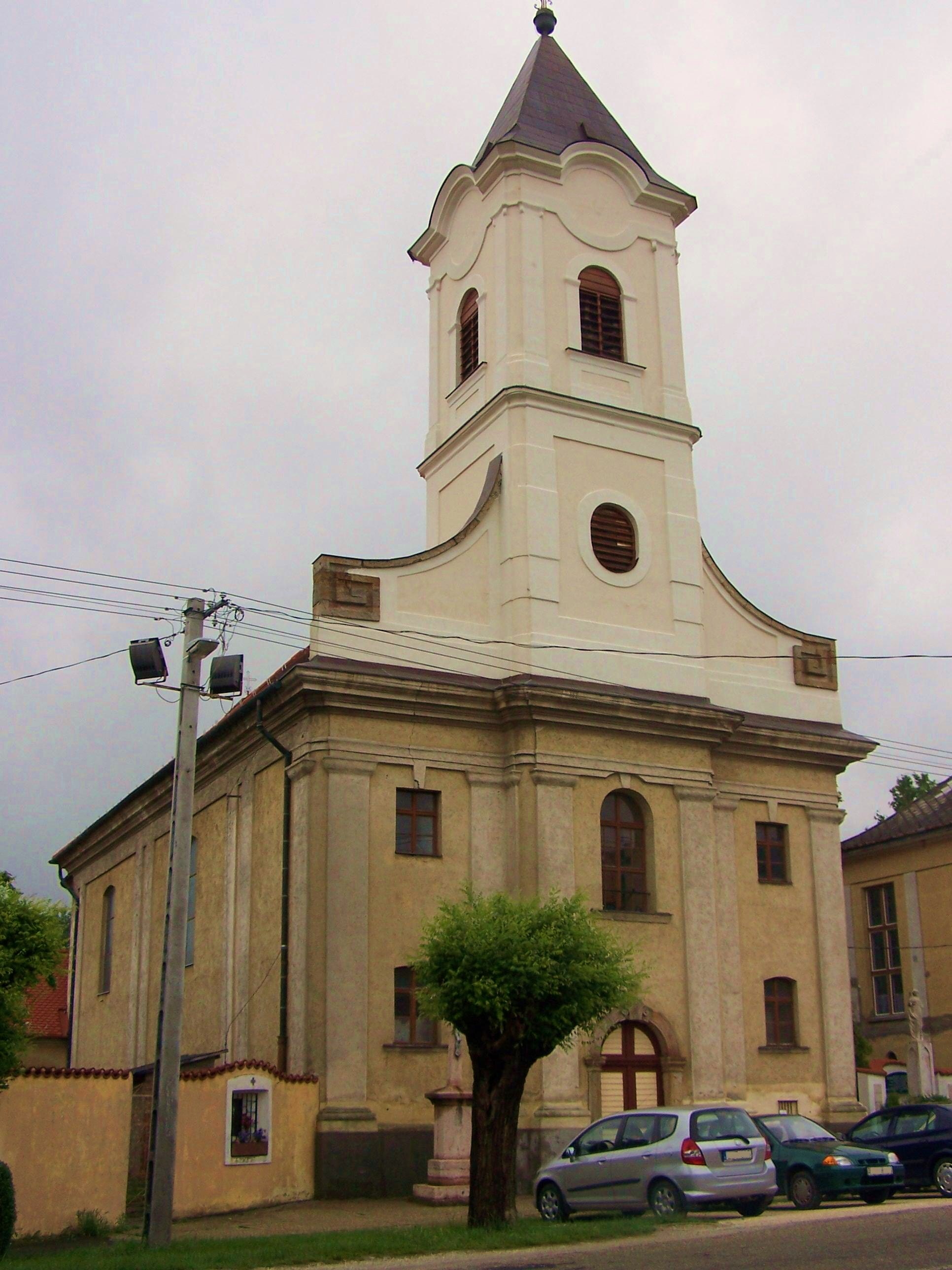 Szent Márton római katolikus templom templom (Tokod, Kossuth u. 3.) This is a photo of a monument in Hungary, Identifier: 6486